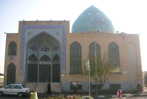 عکس از بالای میدان دانش گرفته شده